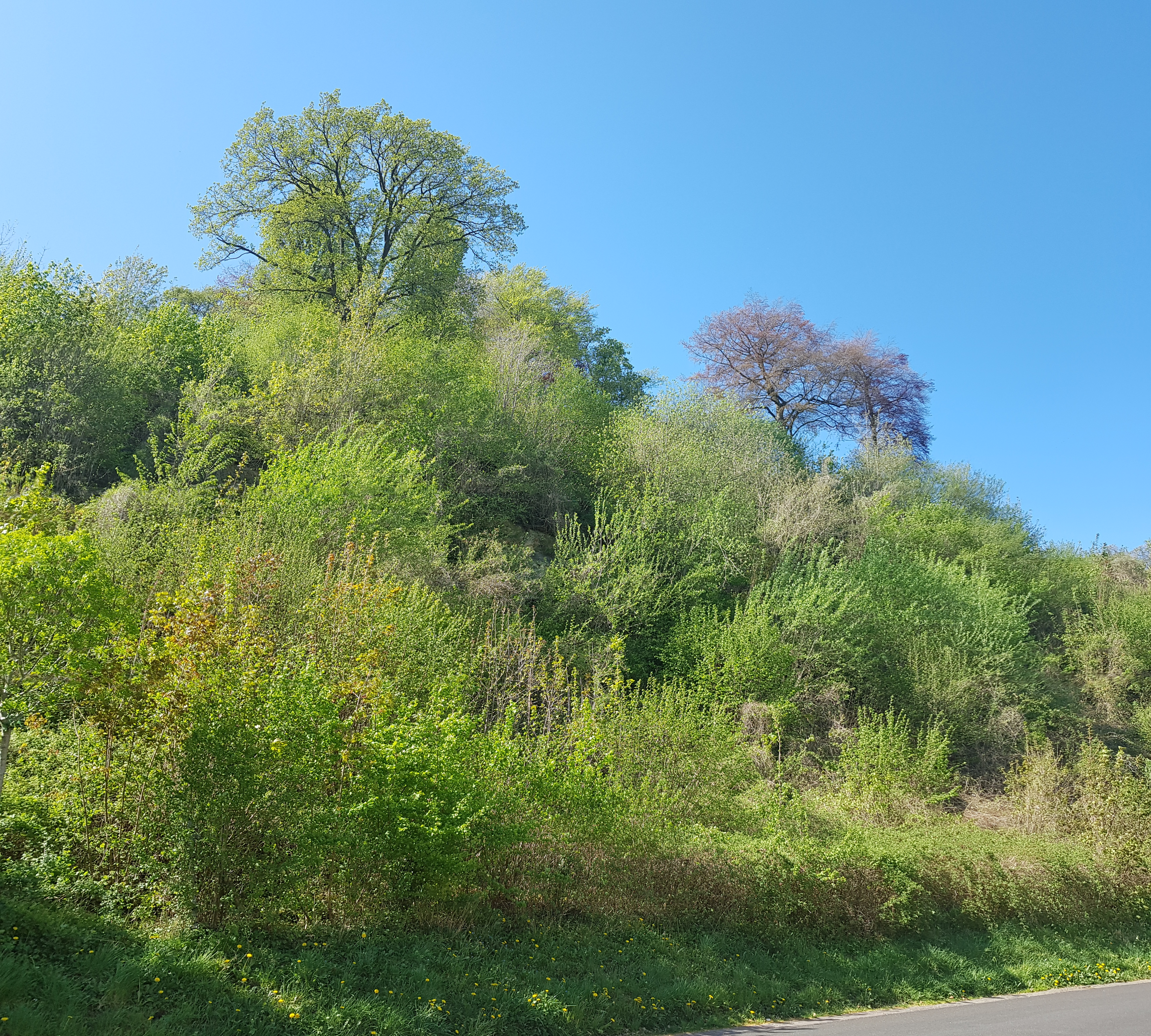 Groeve onder het Rotspark, Valkenburg, Nederland